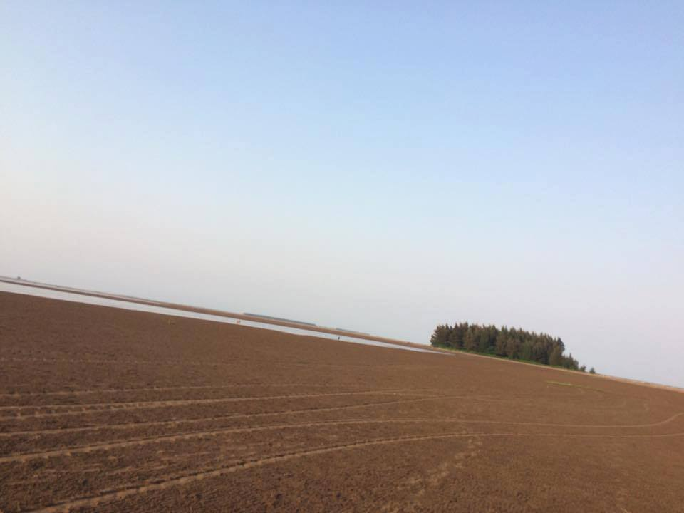 Cồn Nổi Ninh Bình